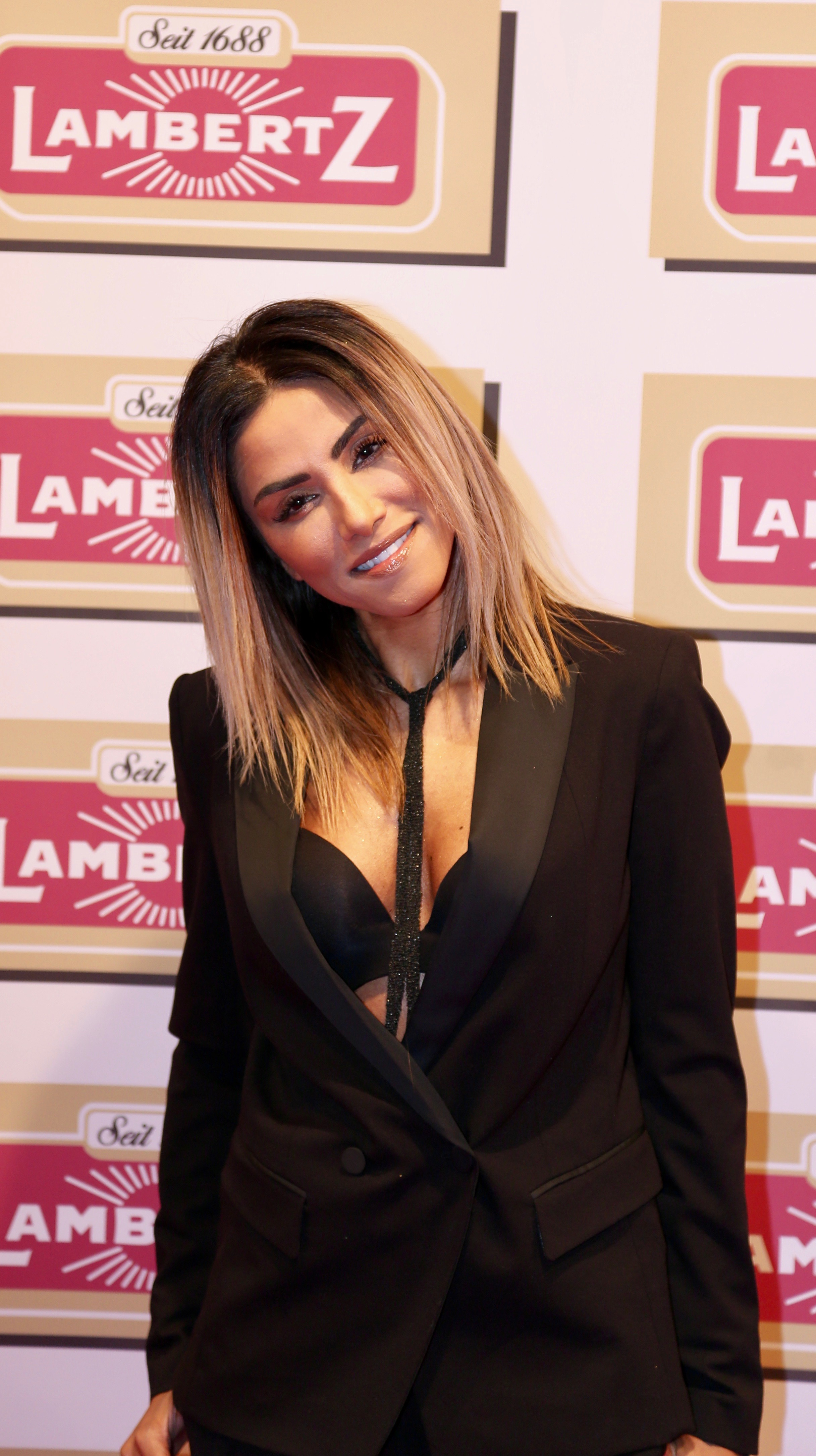 Sabrina Setlur bei der Lambertz Monday Night 2017.